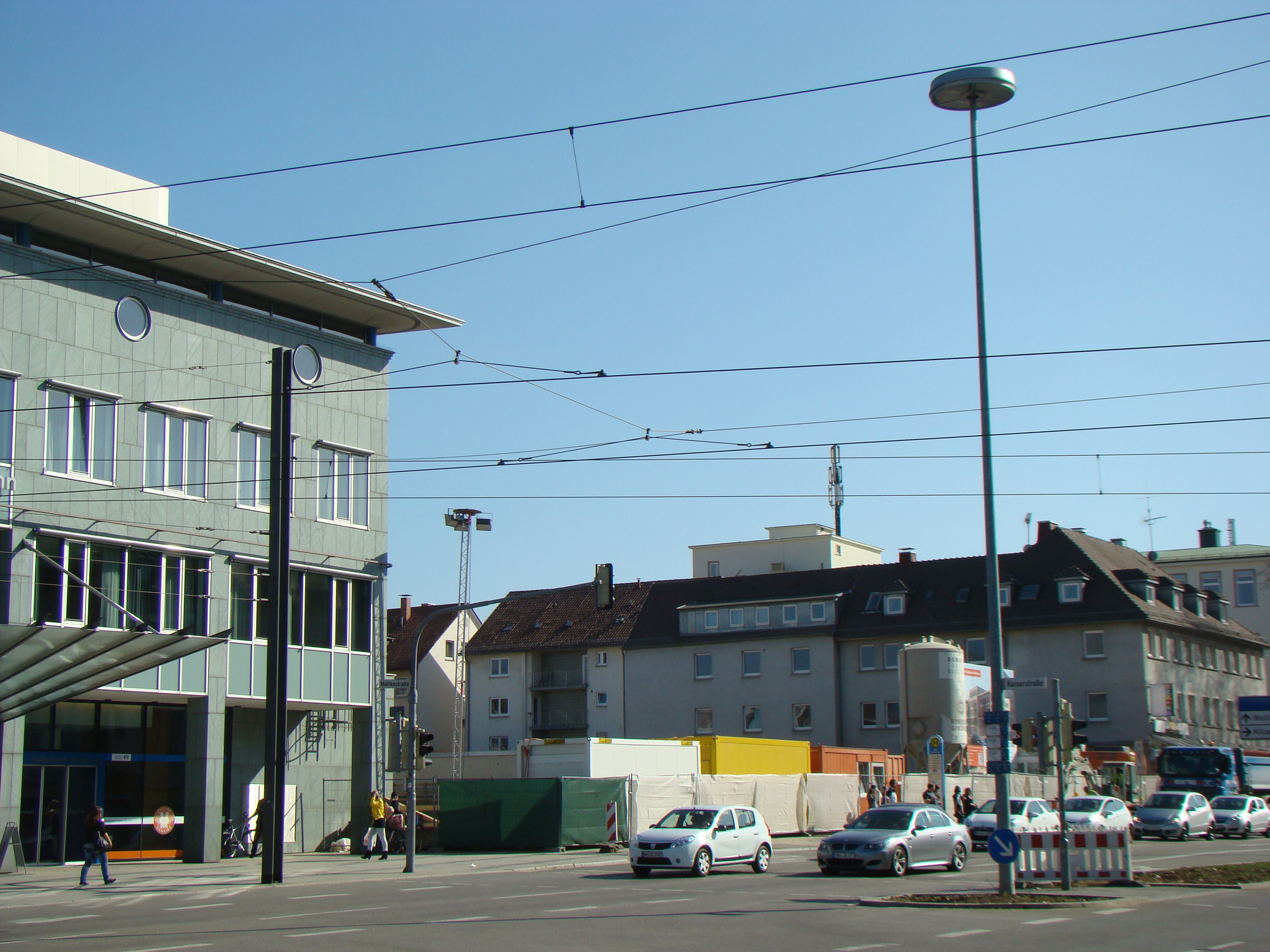 Baulücke am ehemaligen Standort des Gebäudes Allee 18 in Heilbronn, 26. März 2012.